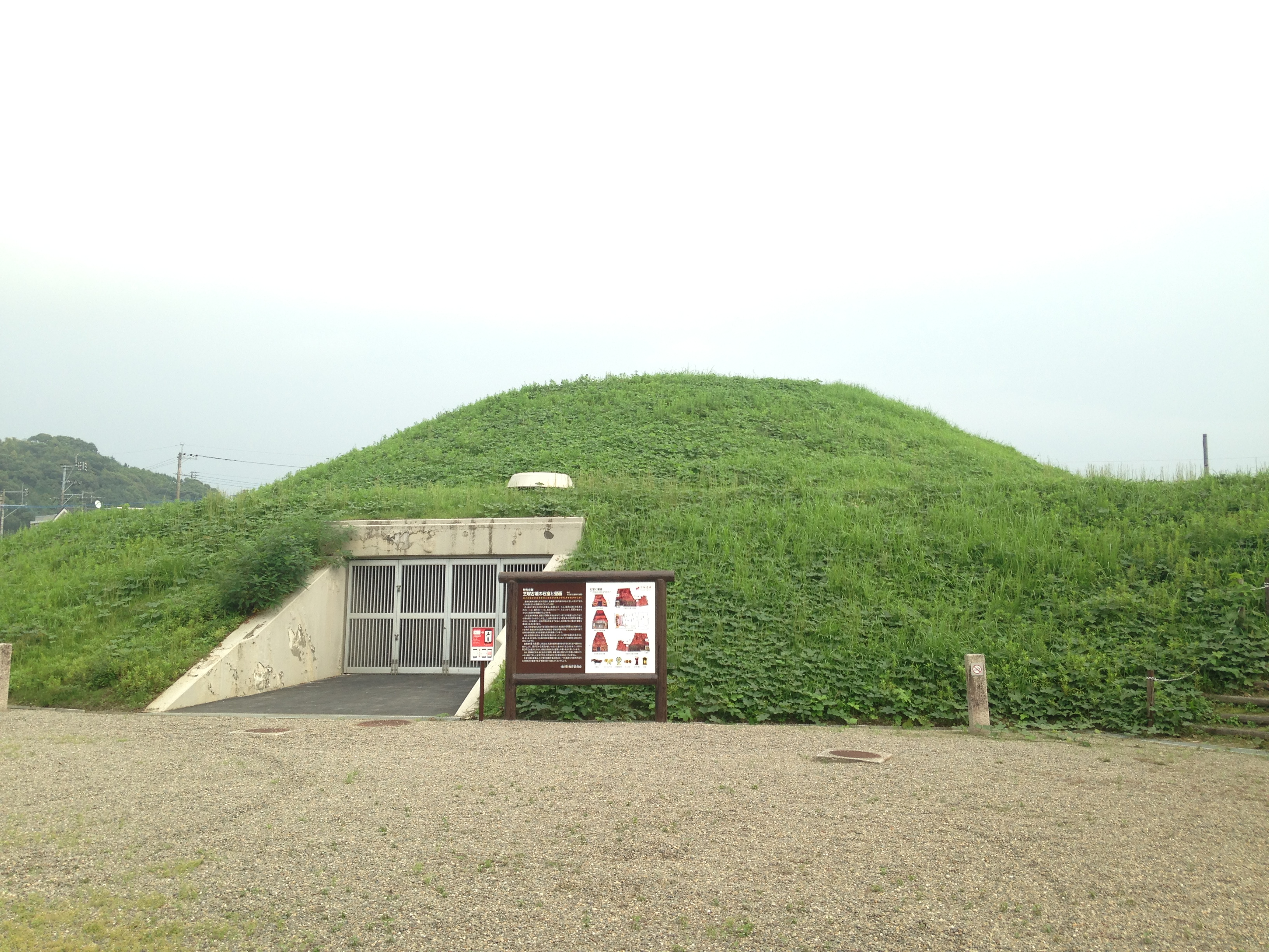 王塚古墳・後円部